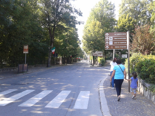 Strada statale 83 Marsicana